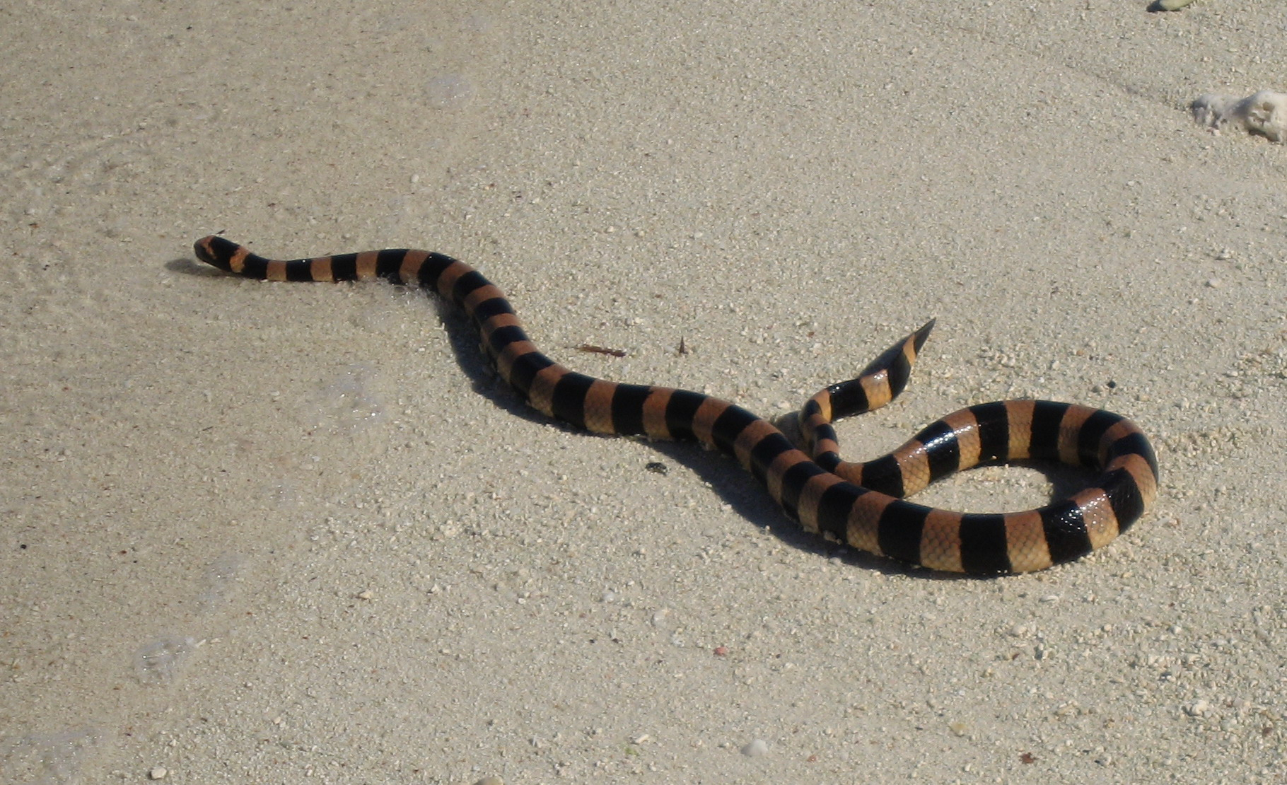 photo prise sur l'ilot du phare amédée - Nouvelle Calédonie